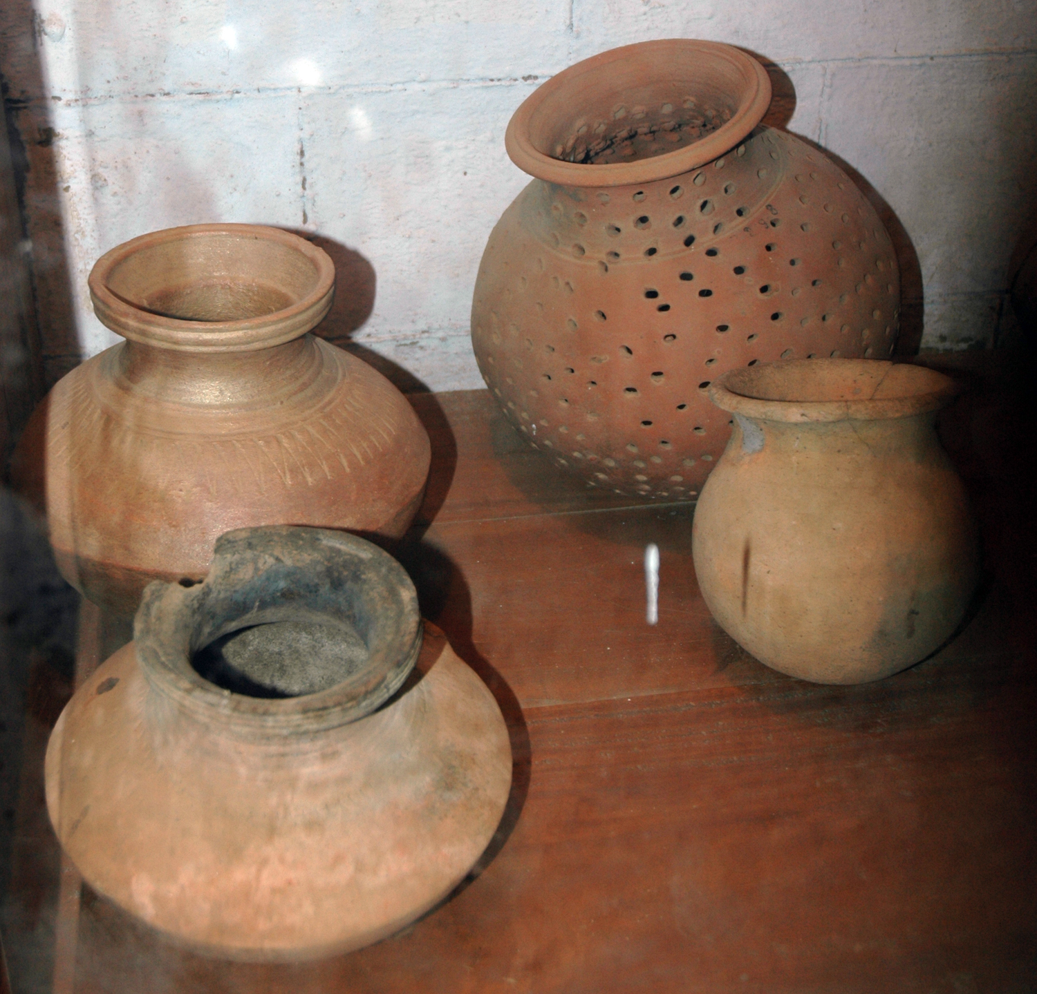 துளைகளுடைய பானை - தொல் பொருட்காட்சிச்சாலை, யாழ்ப்பாணம்